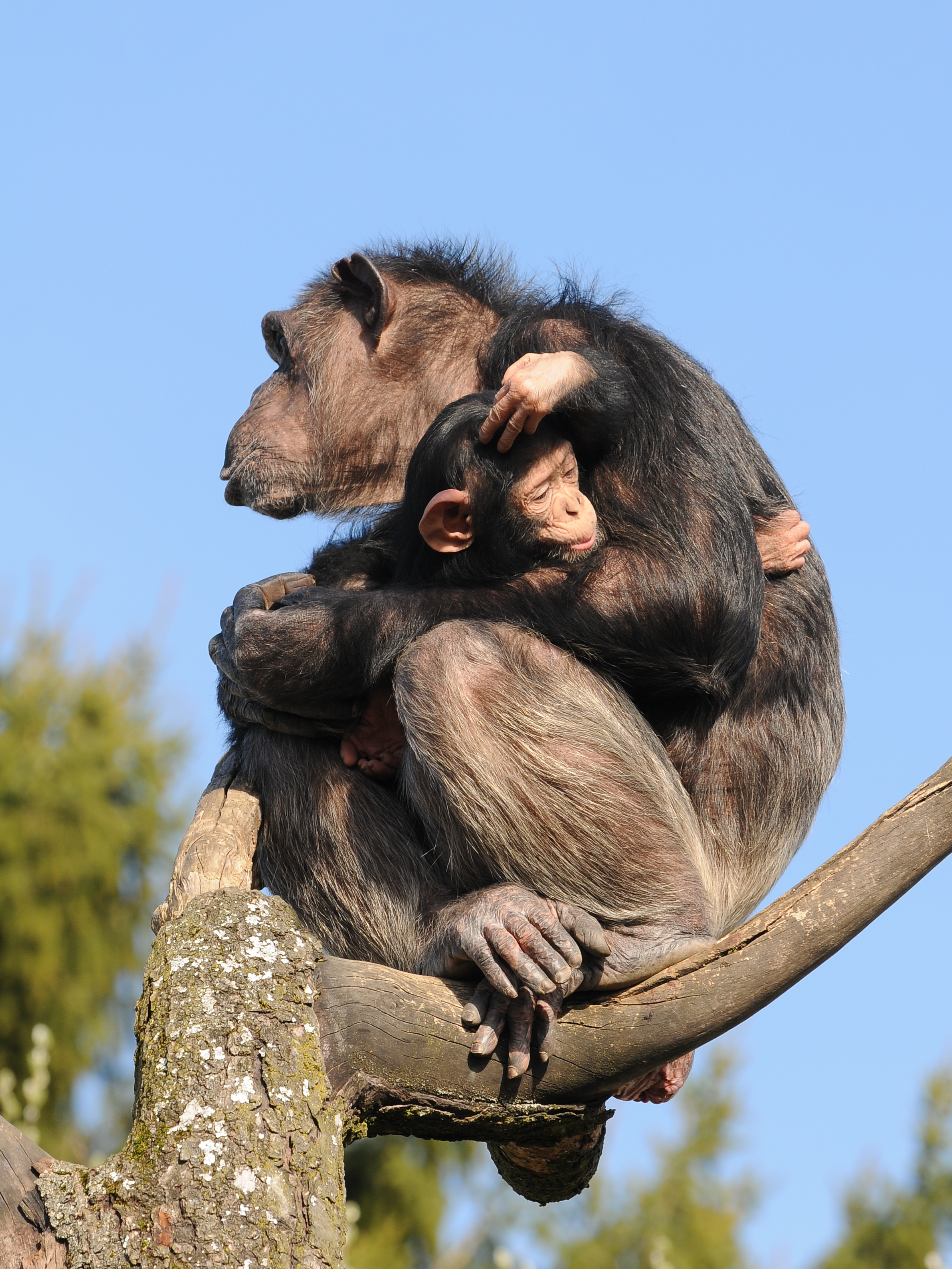 Pan troglodytes